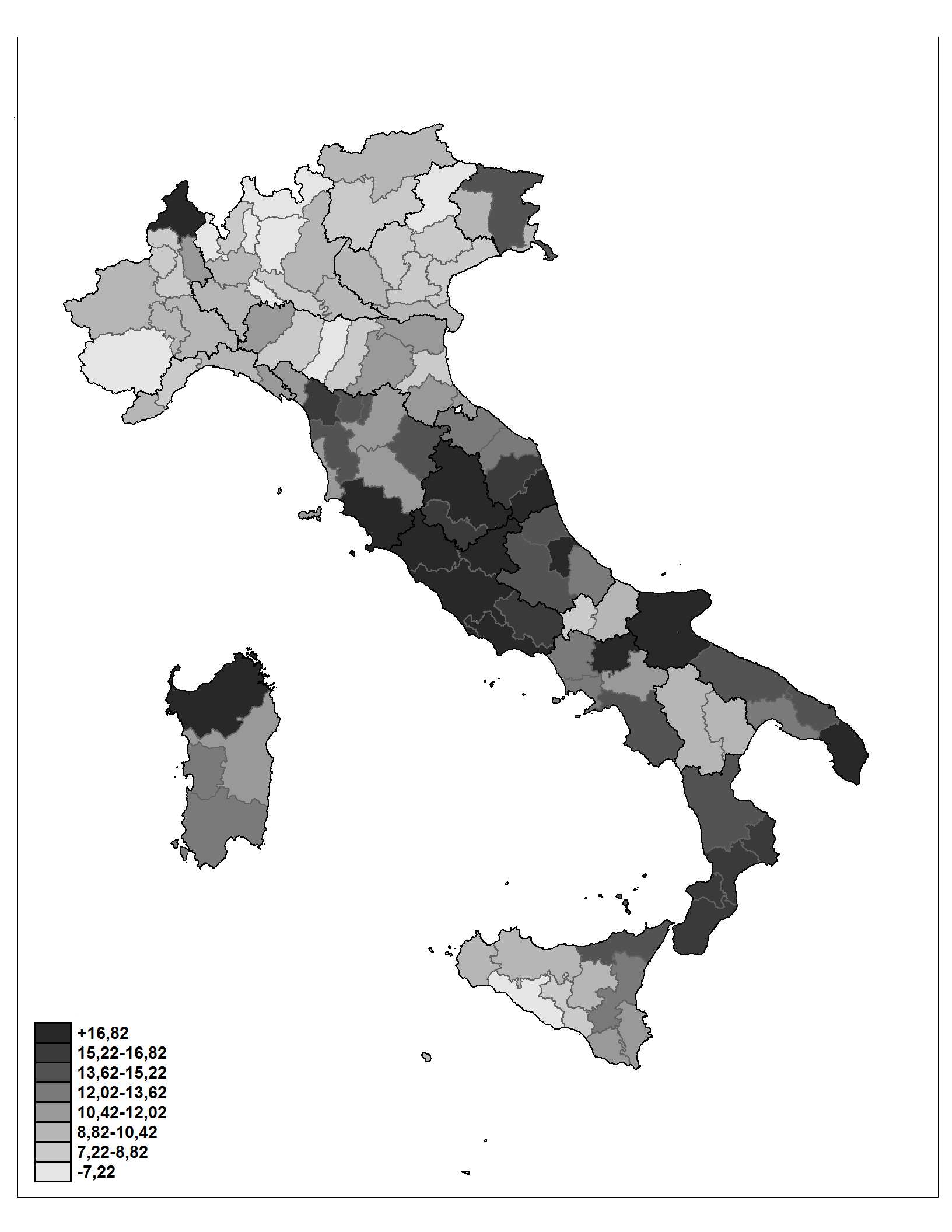 Distribuzione geografica del voto ad Alleanza Nazionale nelle elezioni politiche italiane del 2001.